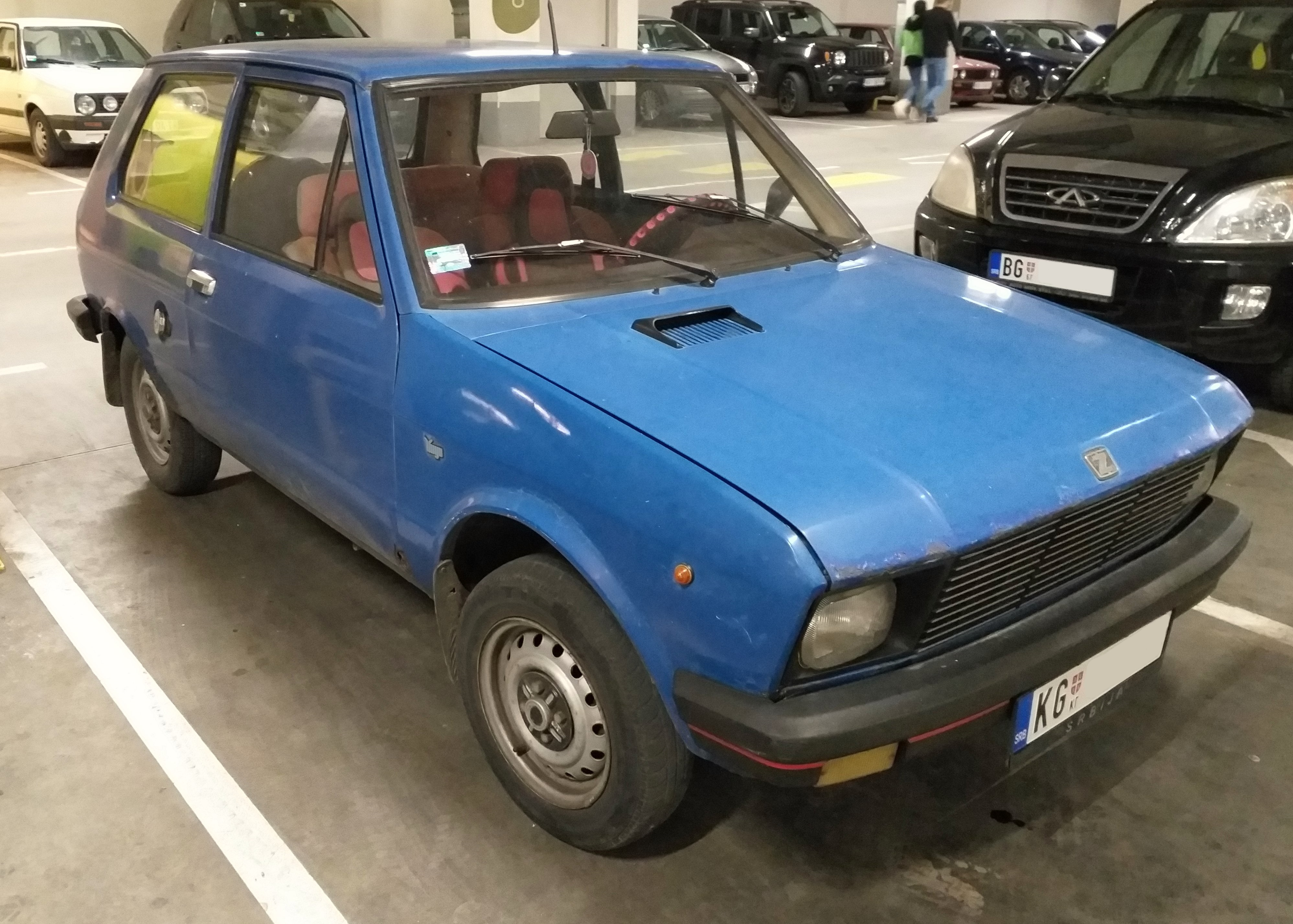 Srpski (latinica): Застава Југо 45